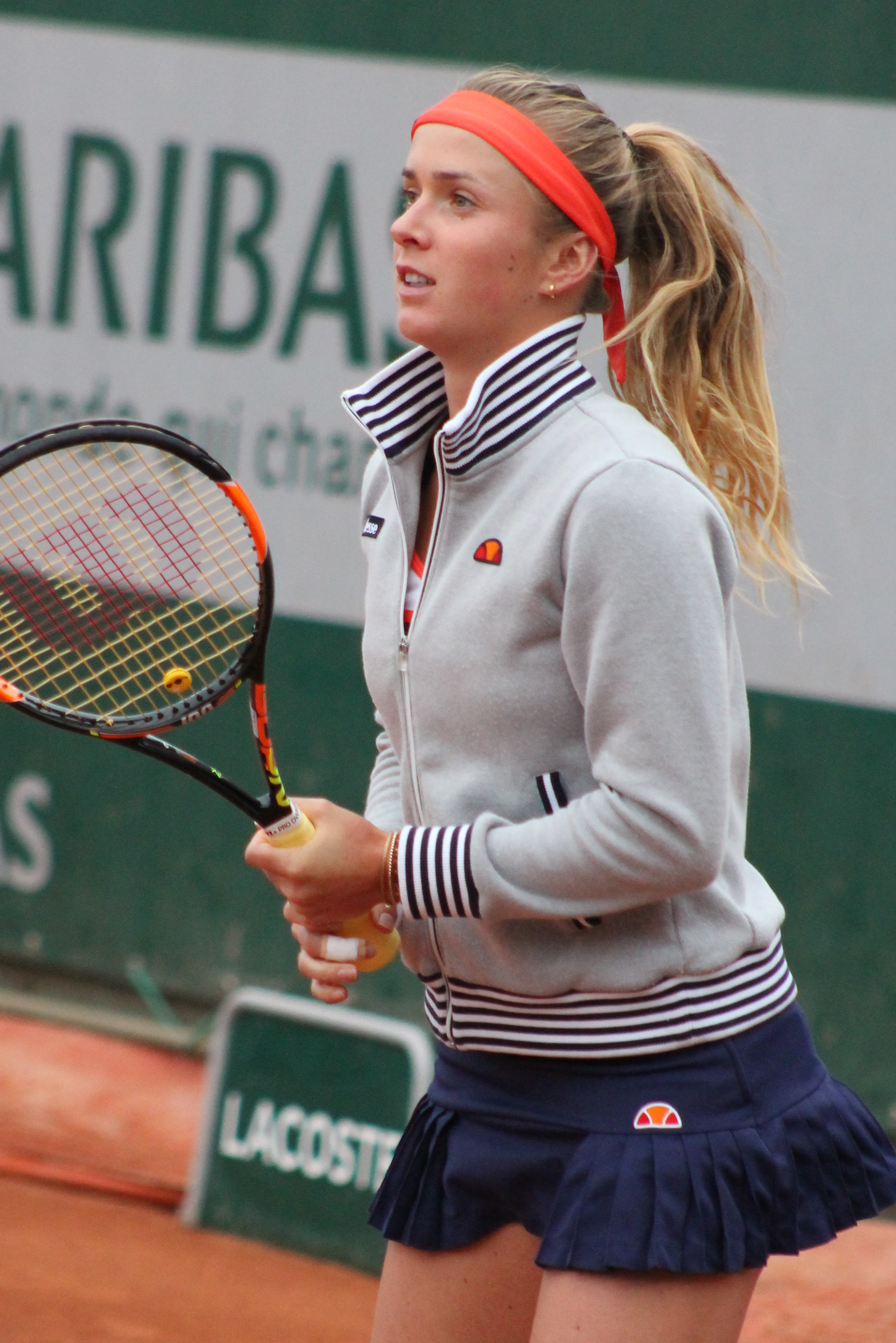 Svitolina RG15 (2)